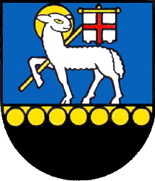 Wappen der politischen Gemeinde Langenbruck, Schweiz